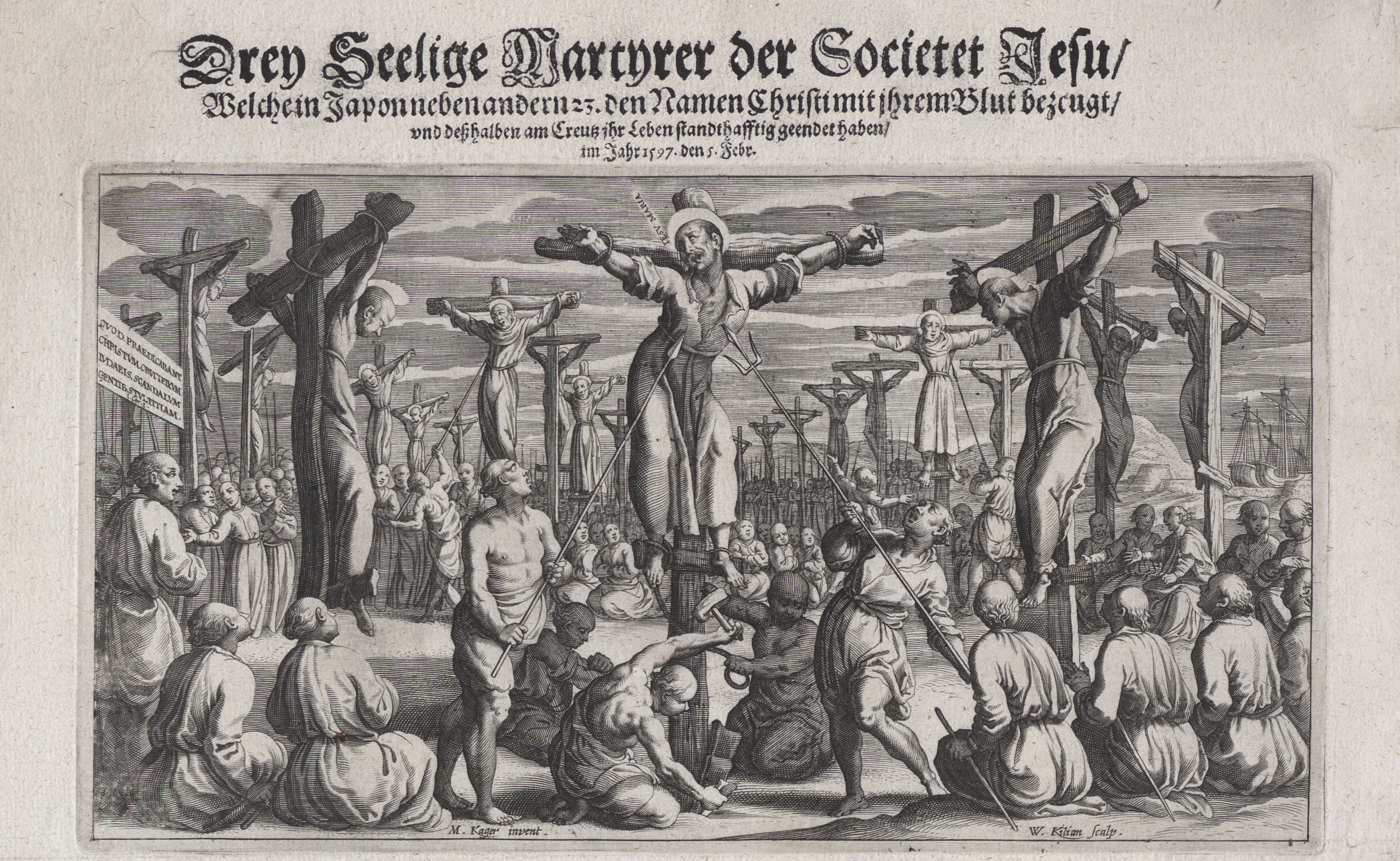 Die Märtyrer von Nagasaki (1597), Stich von Wolfgang Kilian, Augsburg (1581-1663)